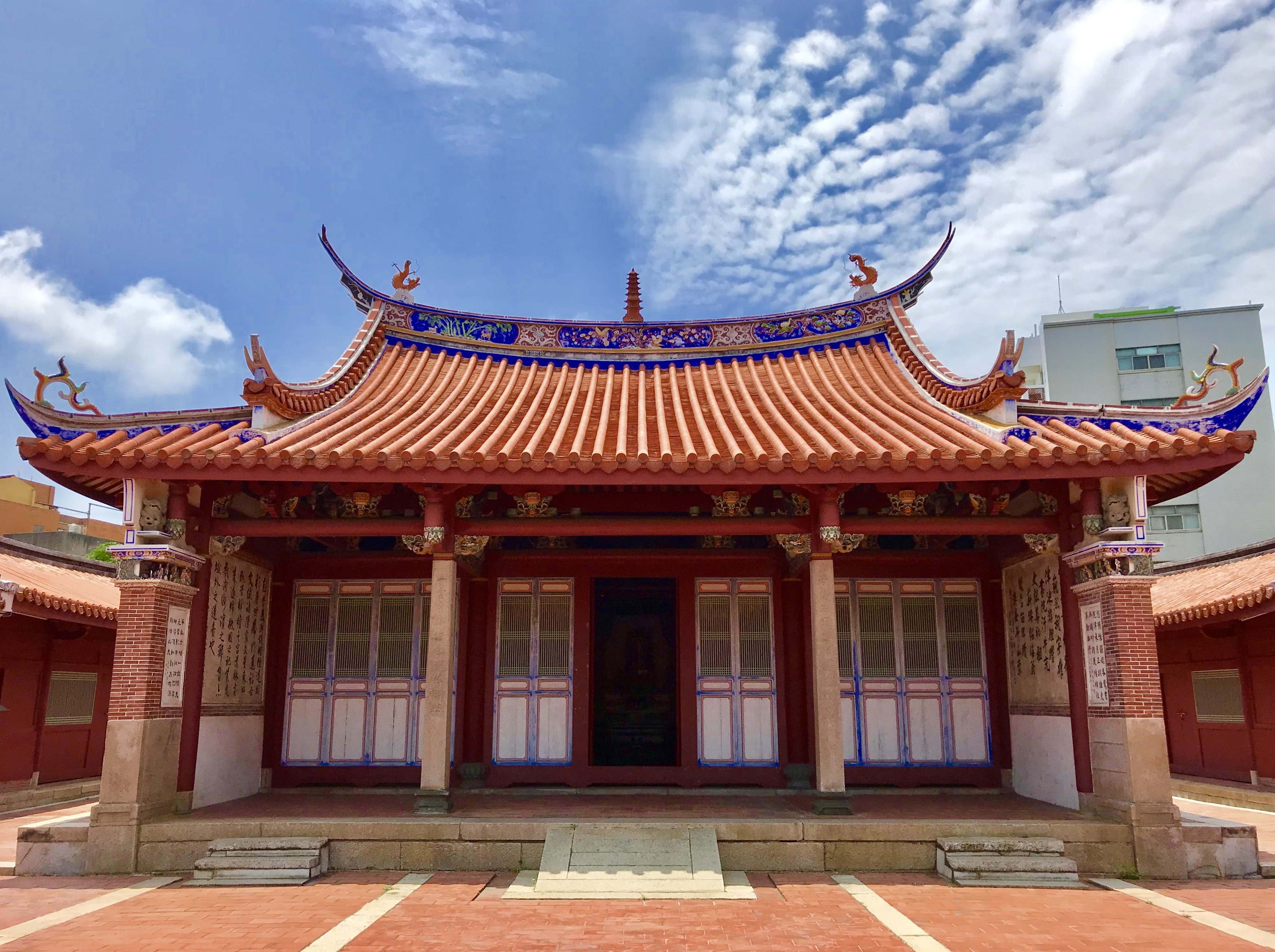 中文（台灣）: 文開書院前堂